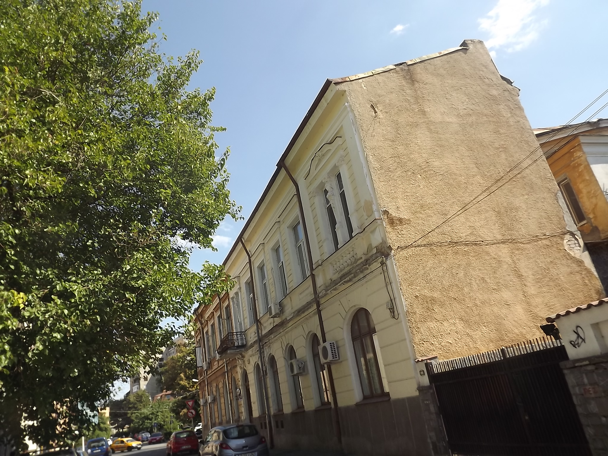 Casă 32